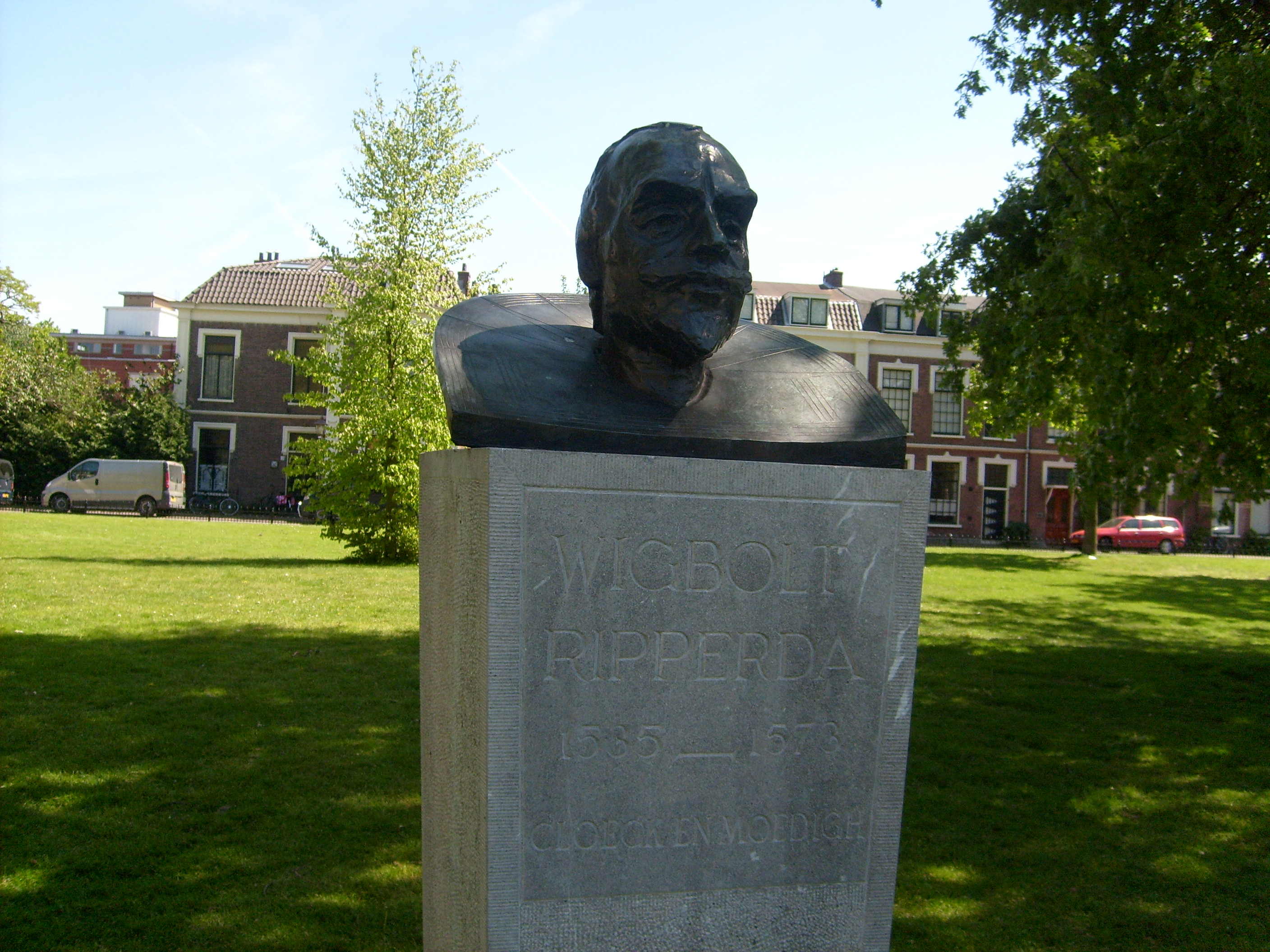 Beeld van Wigbolt Ripperda, Ripperdapark Haarlem, door Jolanda Prinsen, 1984, brons